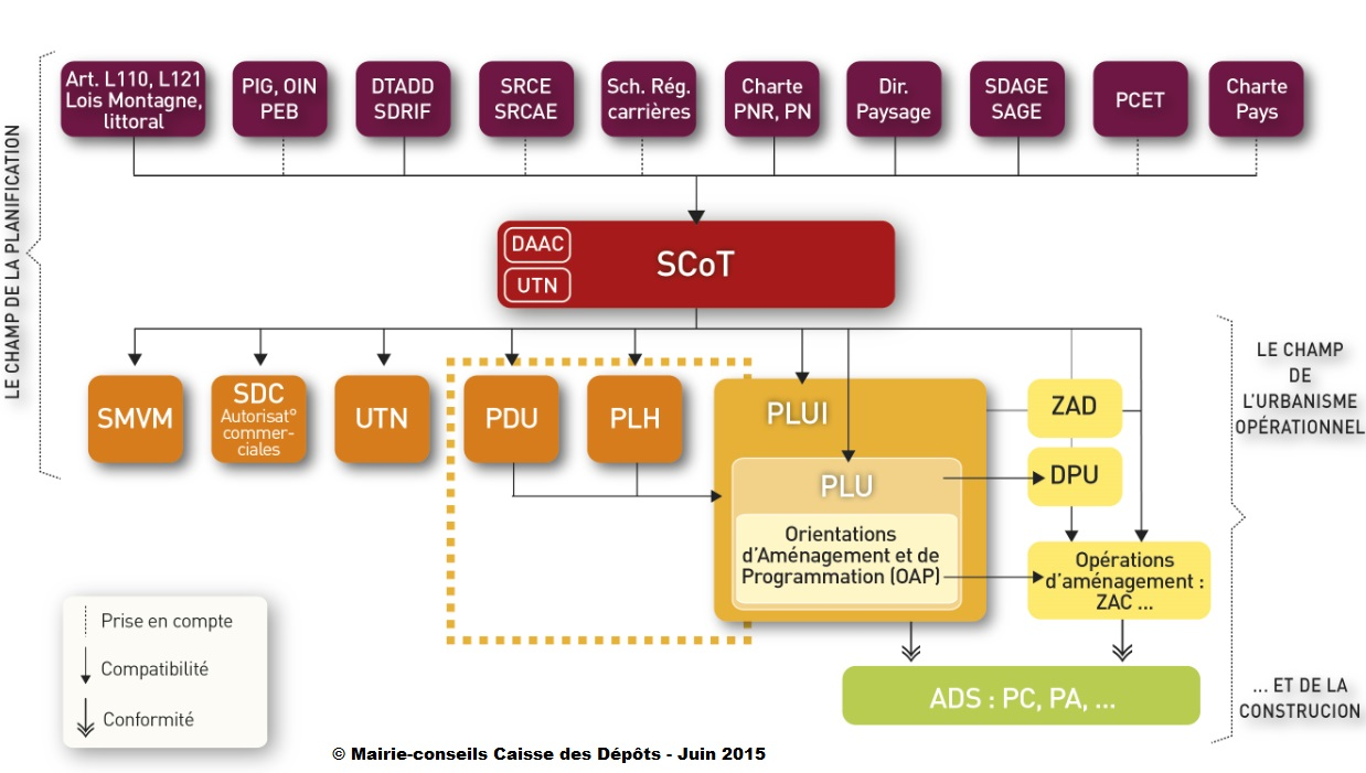 Ce schéma présente la hiérarchie des normes en urbanisme selon la législation en vigueur à la suite de la loi ALUR (mars 2015). Réalisé en juin 2015, il ne prend donc pas en compte les dispositions de la loi NOTRe qui a inséré dans cette hiérarchie des normes le SRADDET.